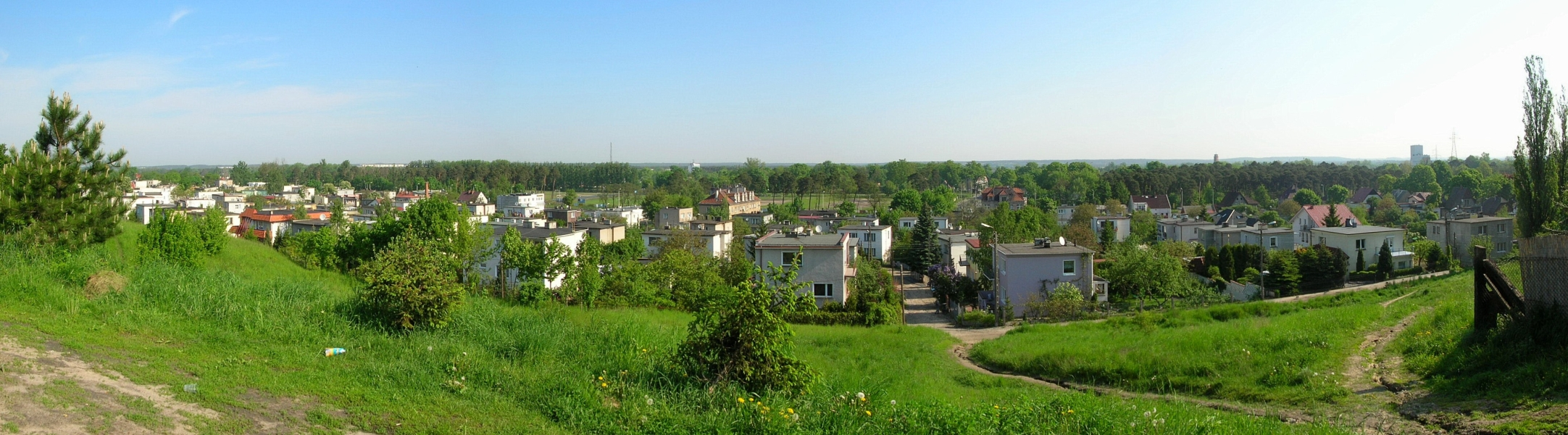 Osiedle Miedzyń w Bydgoszczy